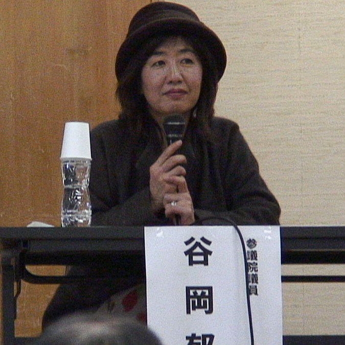 谷岡郁子参議院議員